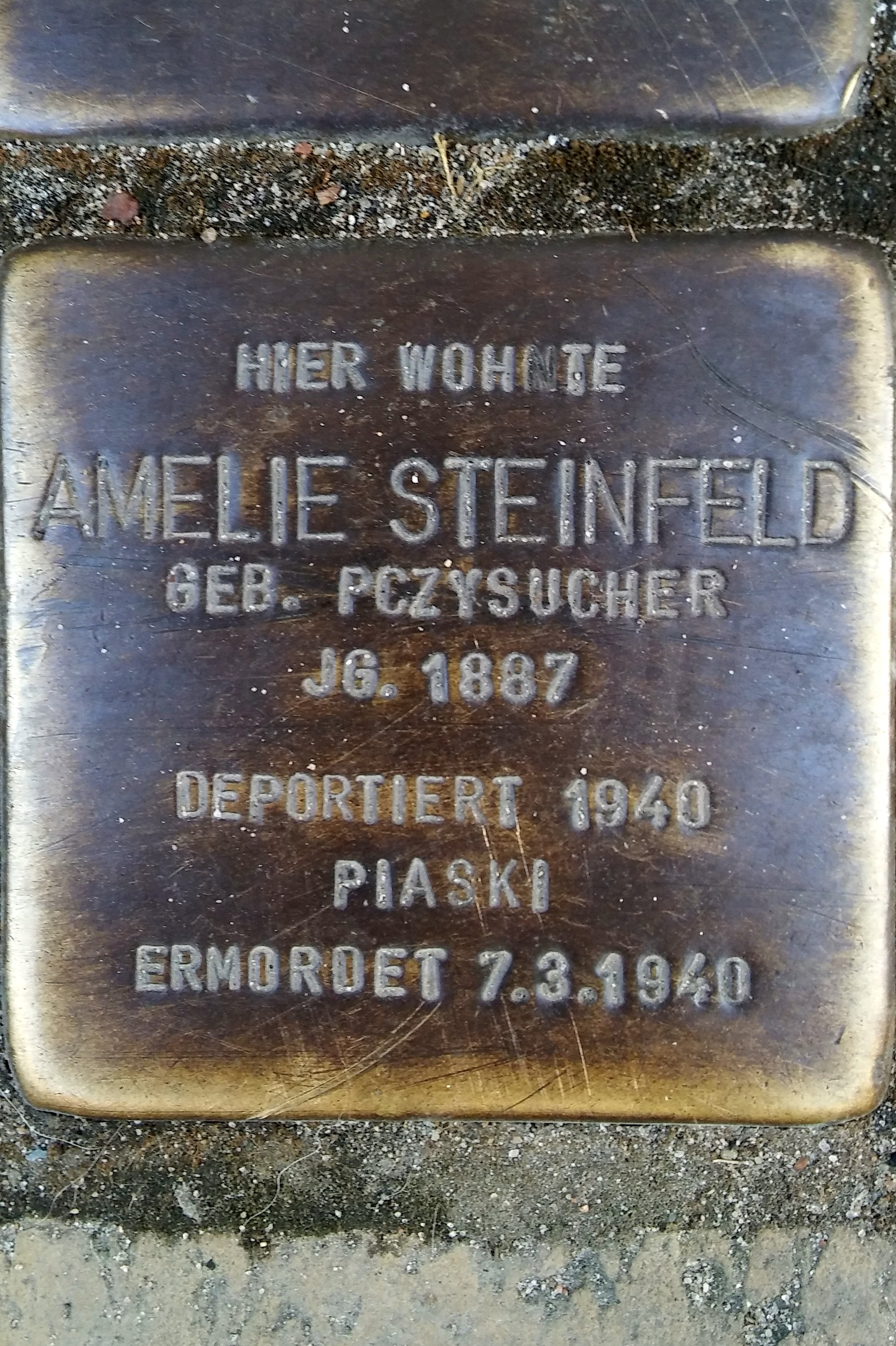 Stralsund, Frankenstraße 43, Stolperstein Amelie Steinfeld